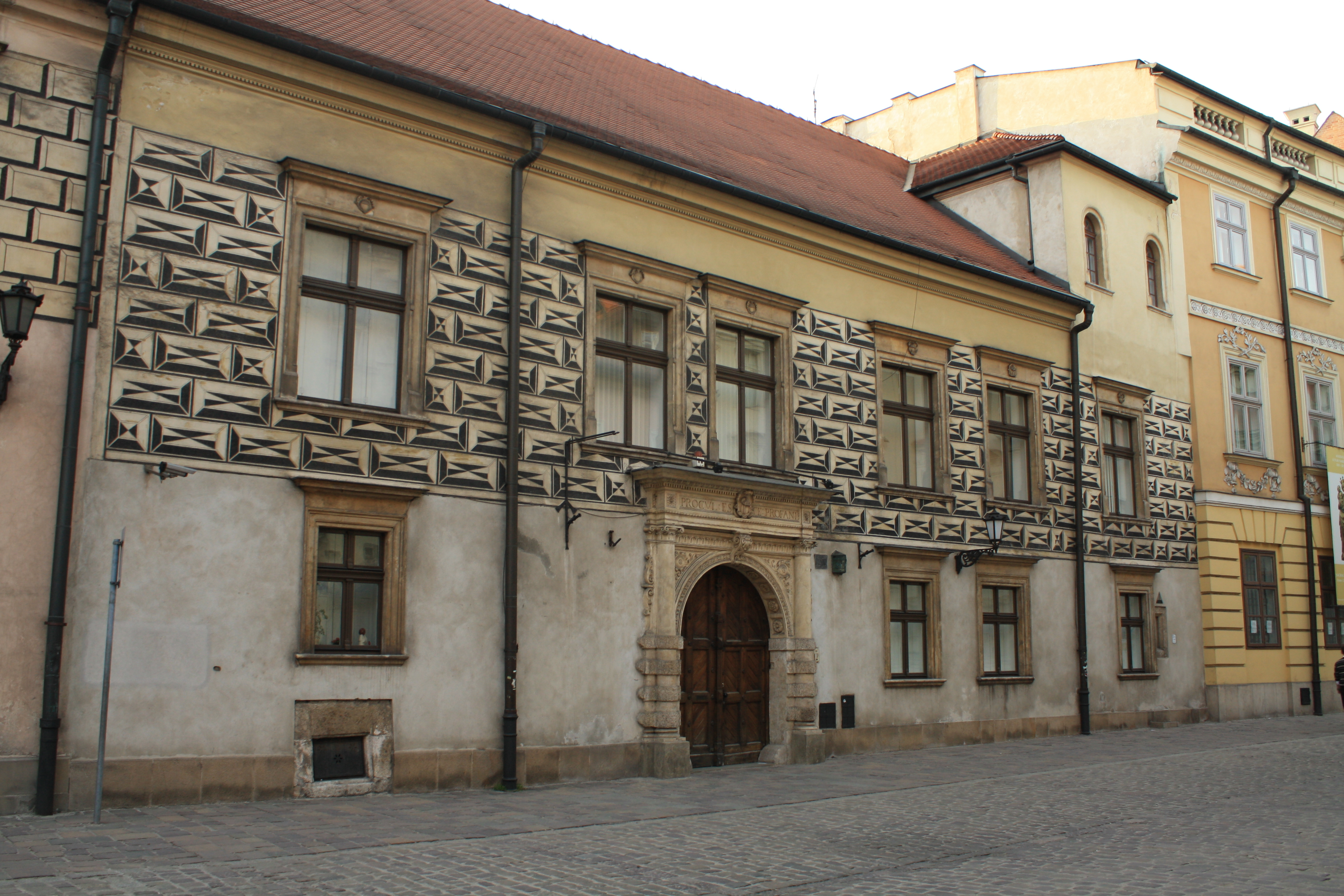 Muzeum Archidiecezjalne w Krakowie, Dom Dziekański, ul. Kanonicza 21